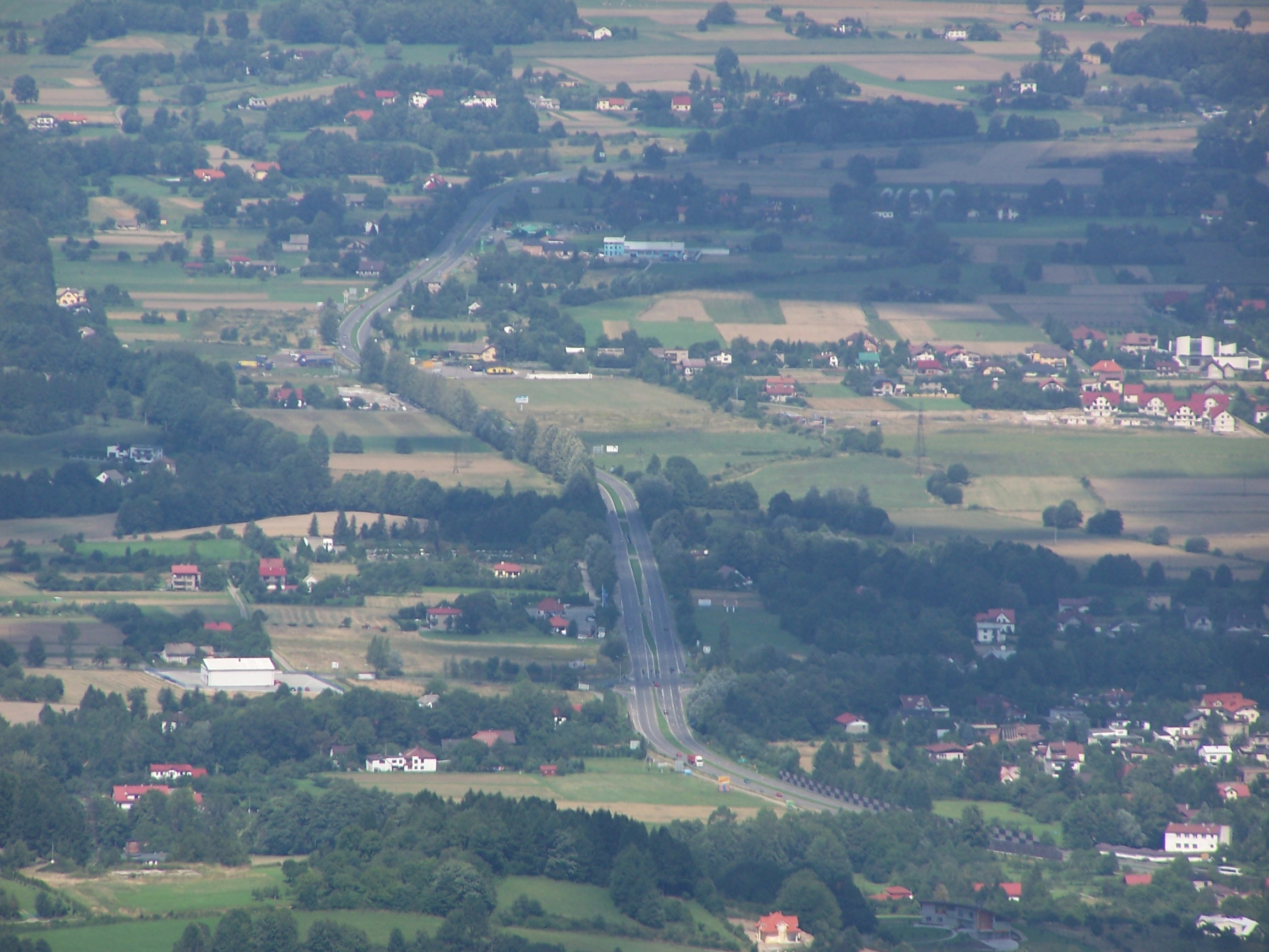 Czantoria - widok z wiezy widokowej